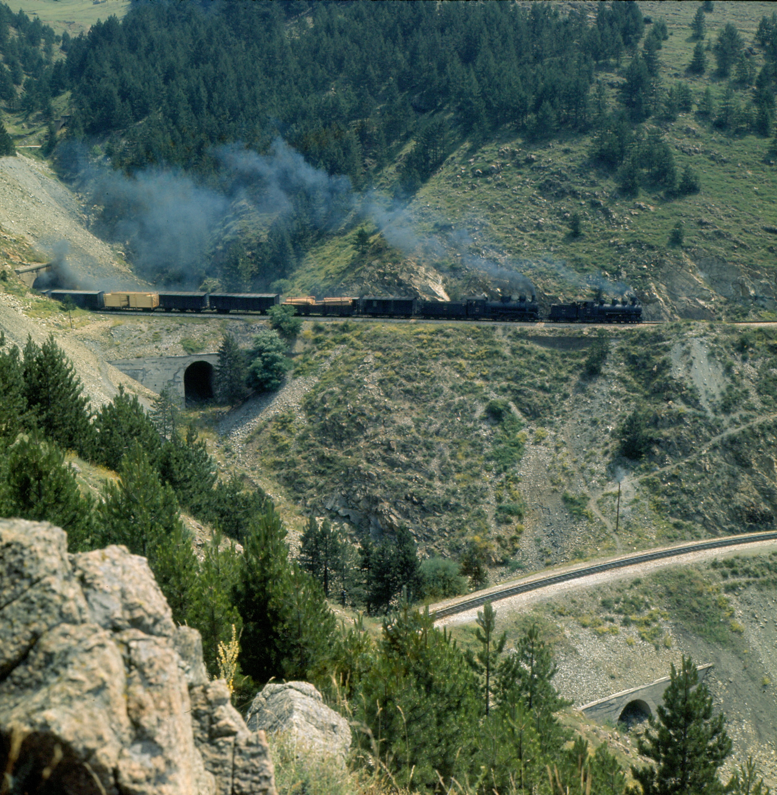 Šarganska osmica, Bergfahrt Güterzug mit Doppeltraktion BR83 und BR85